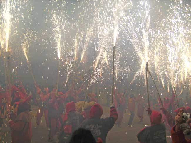 Correfoc a Terrateig en les VII Jornades Diableres del País Valencià. 10/11/2007